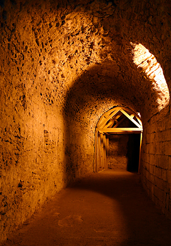 Interior do Teatro Romano de Cadiz. Arquitetura do Sec. I a.C.